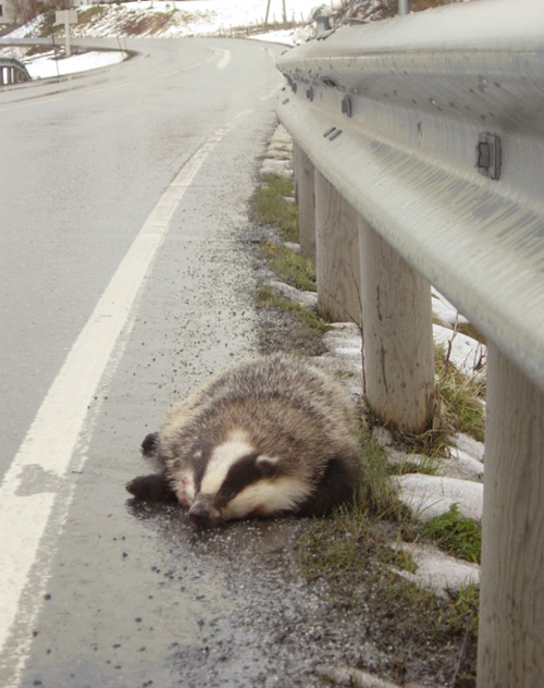 Meles meles - dead